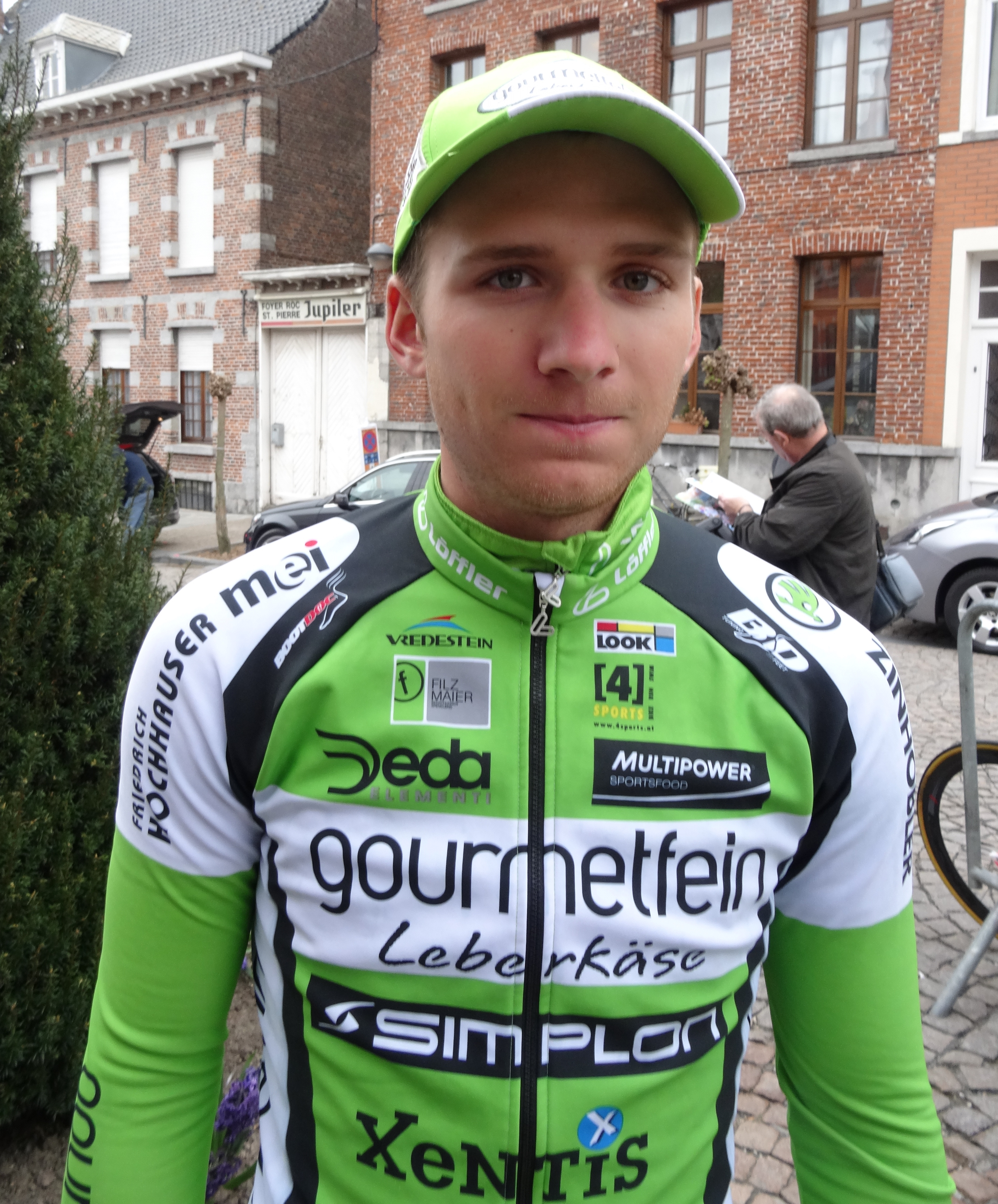 Triptyque des Monts et Châteaux 2014, étape 1, 4 avril 2014, départ d'Antoing. Depicted person: Daniel Biedermann Depicted team: Gourmetfein Simplon Wels The creation of these files was made possible thanks to the organizers of the Triptyque des Monts et Châteaux 2014 English | français | +/−